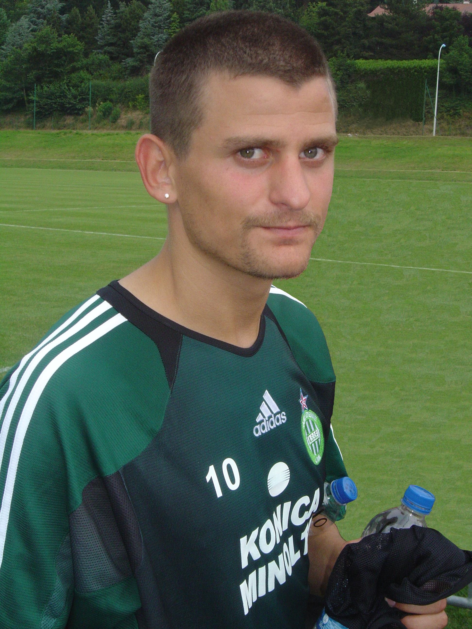 Photo du joueur de football Sébastien Mazure lors de la saison 2005-2006. Cette photo à été prise par Mickaël Roure alias Altrensa pour Wikipédia. Elle ne saurait être utilisée sans la mention de son auteur. D'avance merci.